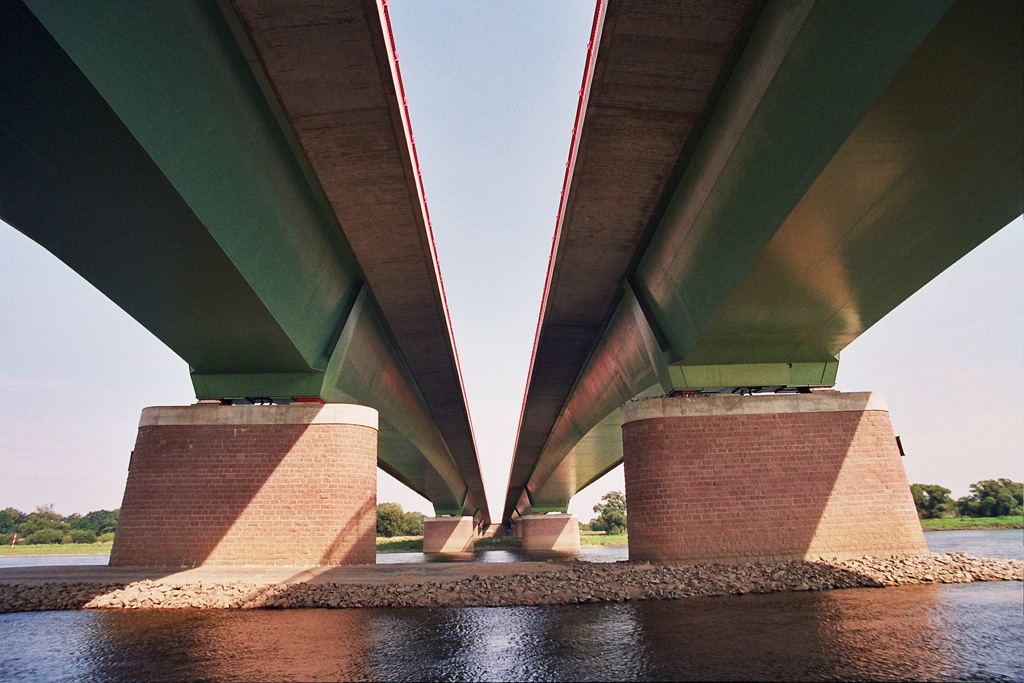 Elbbrücke near Dessau, BAB9